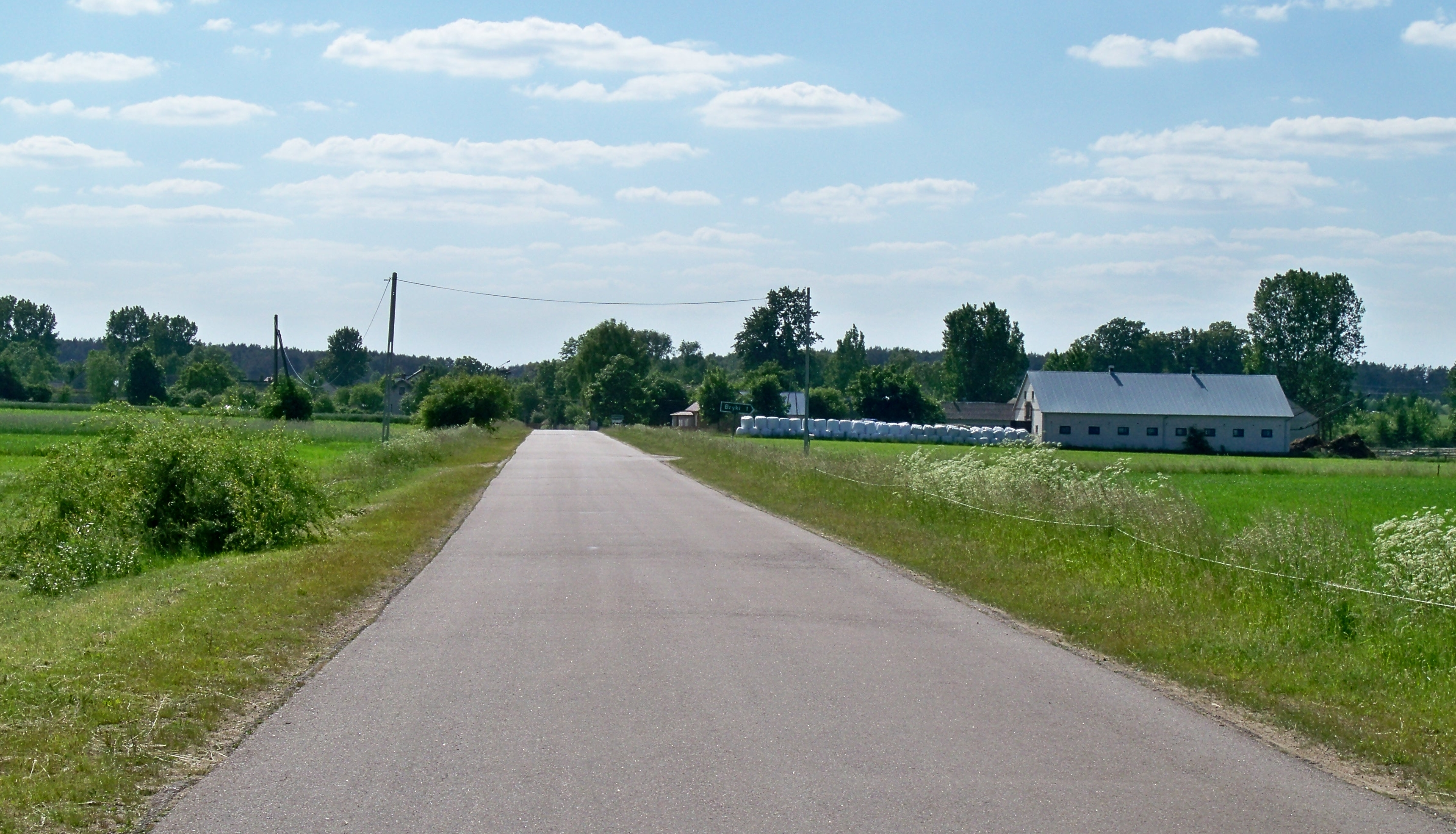 Miłkowice-Paszki k. Drohiczyna